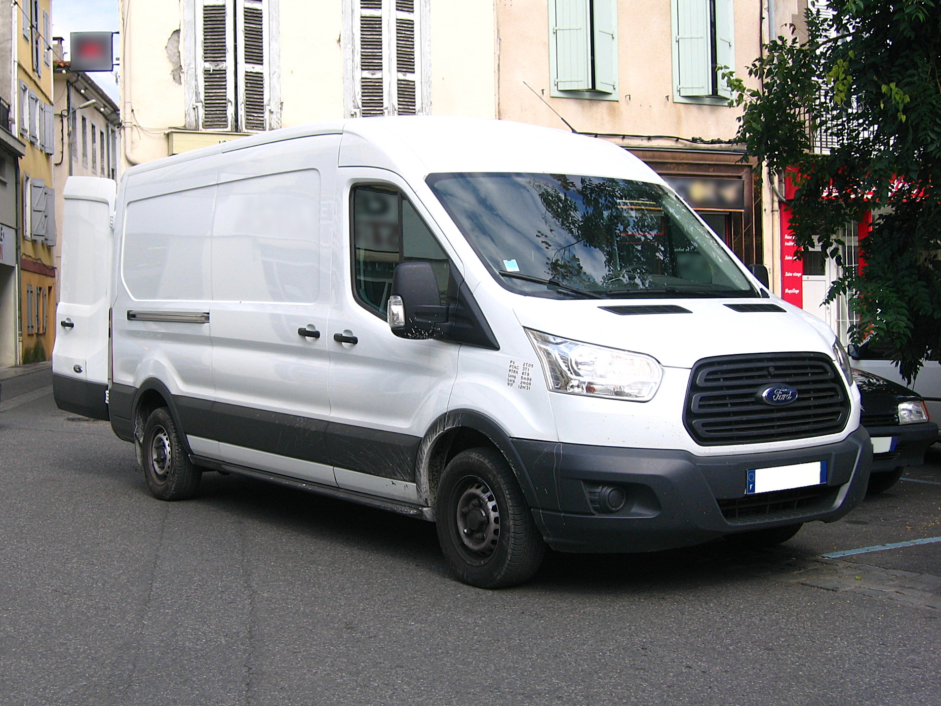 2014 Ford Transit L3 H2.